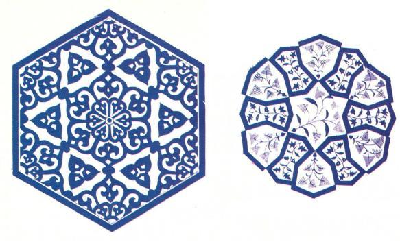 الفن القاشاني - الذي يستخدم اللون الأزرق كثيرا